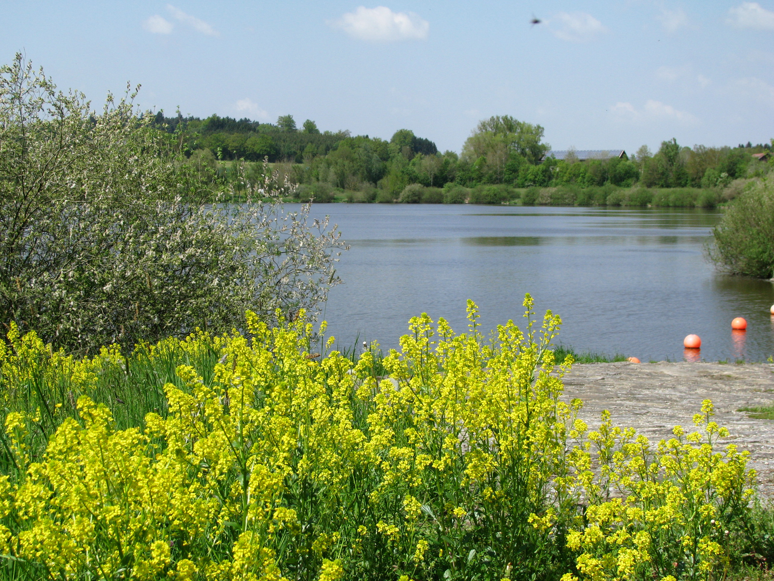 Rottauensee